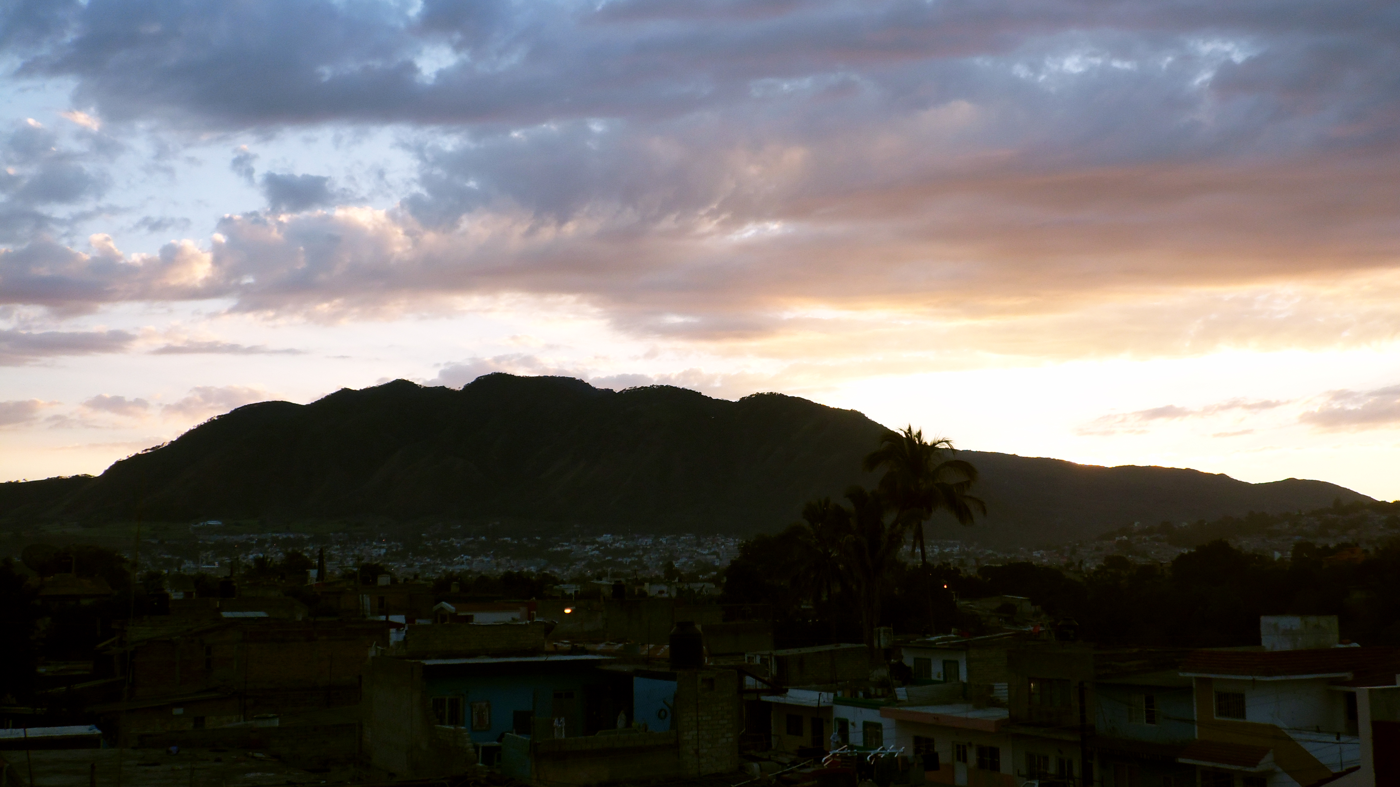 Toma del Cerro de San Juan ubicado al oeste de la ciudad mexicana de Tepic en Nayarit.